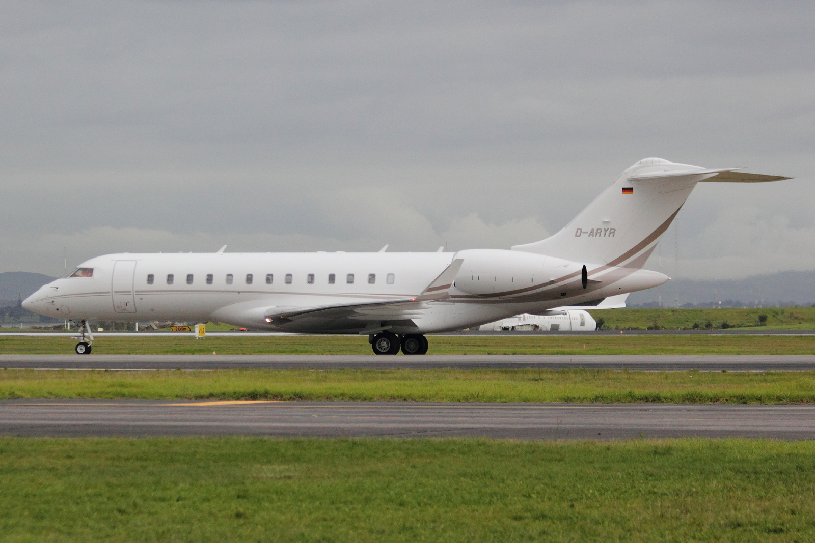 D-ARYR Bombardier BD700 Global Express XRS (9419), ACM Air Charter, 26 June 2013 - Auckland